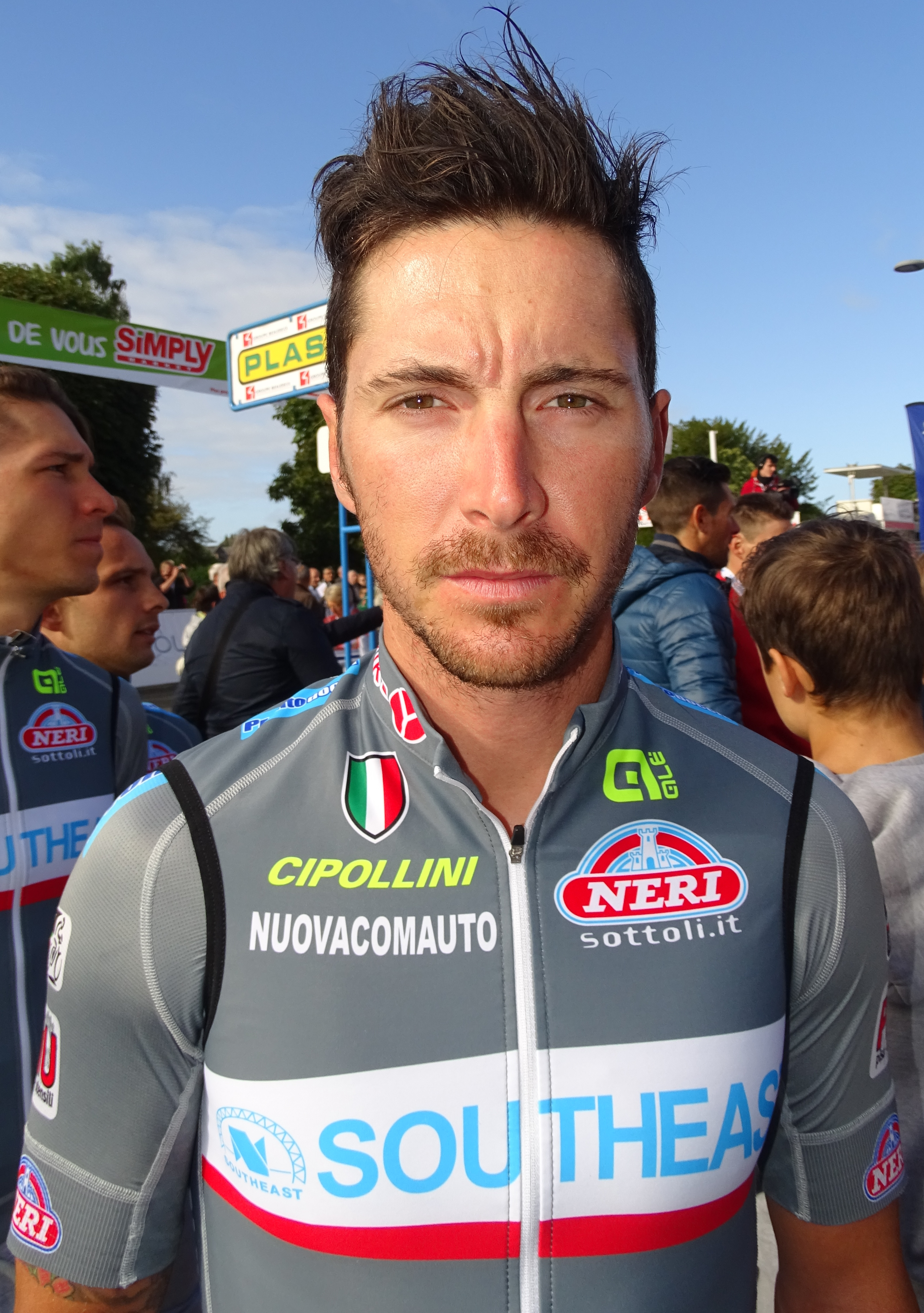 Reportage réalisé le dimanche 6 septembre à l'occasion du départ et de l'arrivée du Grand Prix de Fourmies 2015 à Fourmies, Nord-Pas-de-Calais, France.